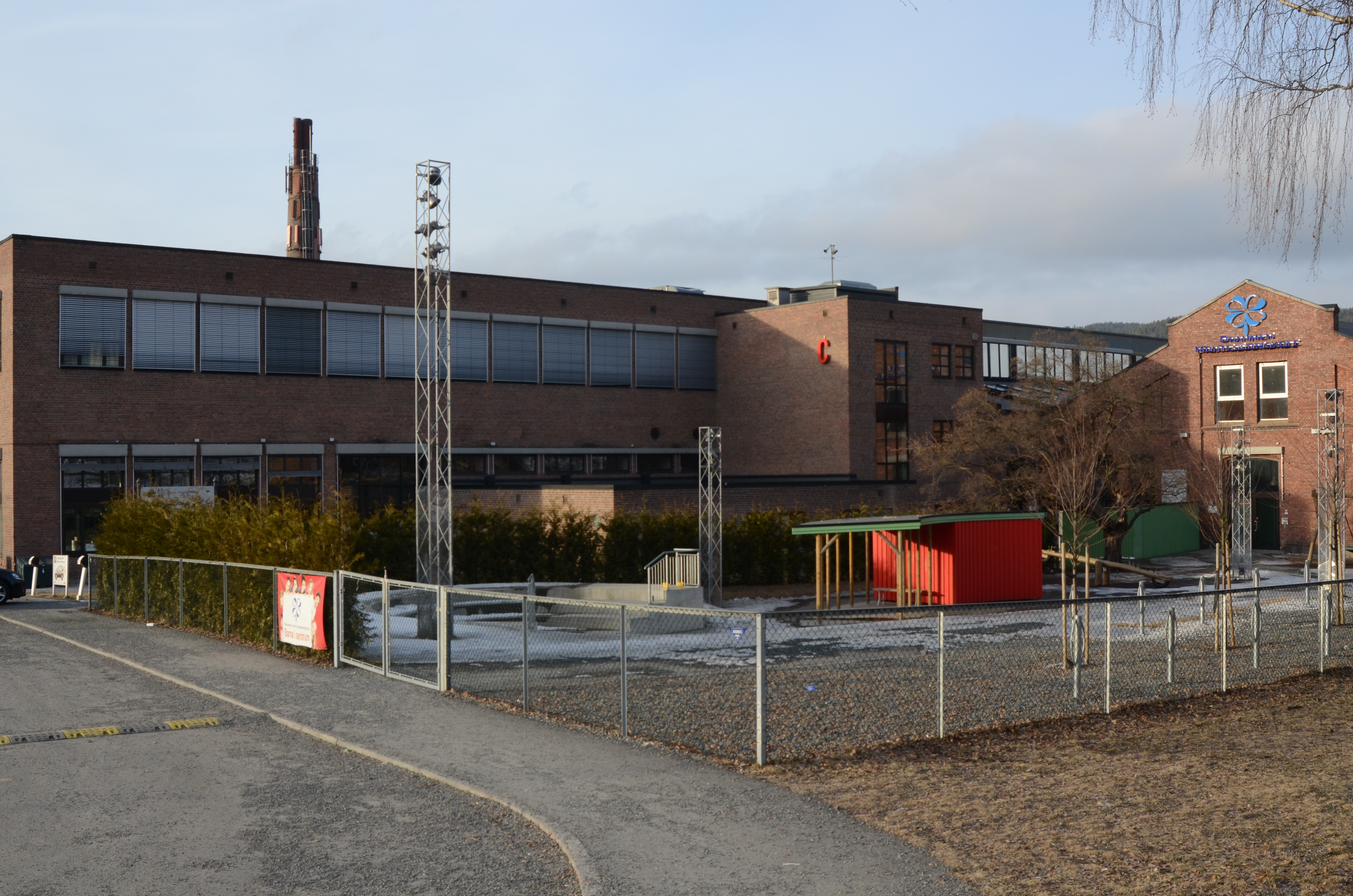 Bygg C på industriområdet Sundland i Drammen.